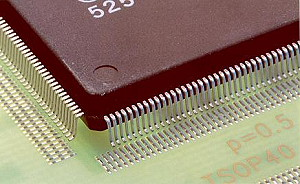 Dosierte Lotpaste